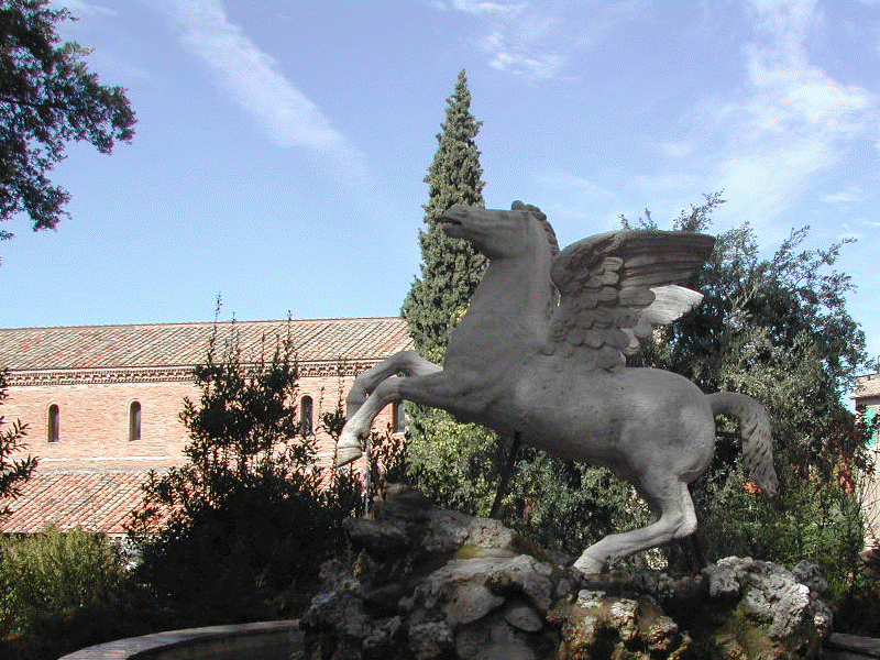 Tivoli, Villa d'Este - fontana di Pegaso e chiesa di S. Pietro.